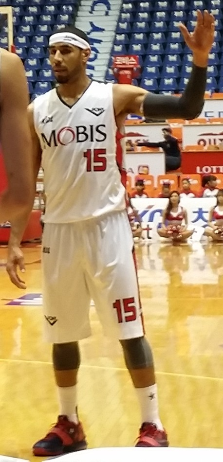 부산 KT 소닉붐 대 울산 모비스 피버스, 사직실내체육관